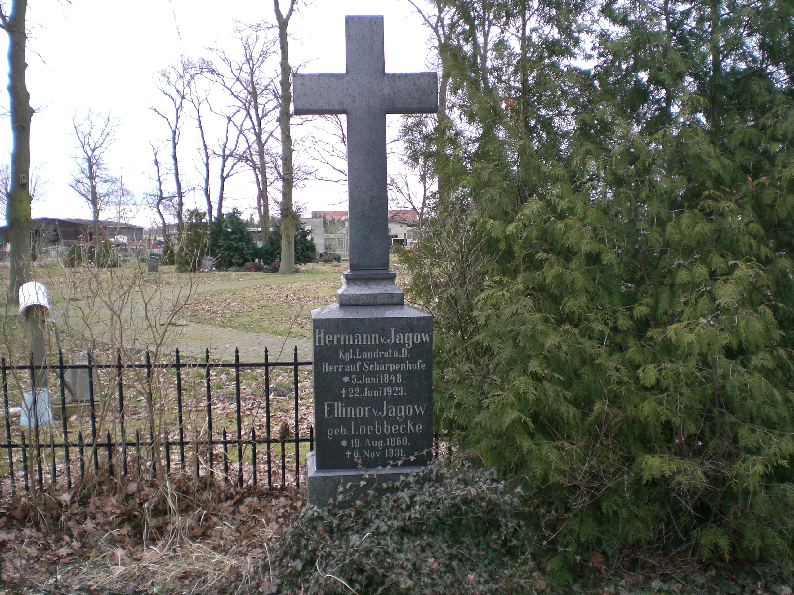 Grabstätte des Landrats Hermann von Jagow und seiner Familie auf dem Friedhof Pollitz/ Altmark